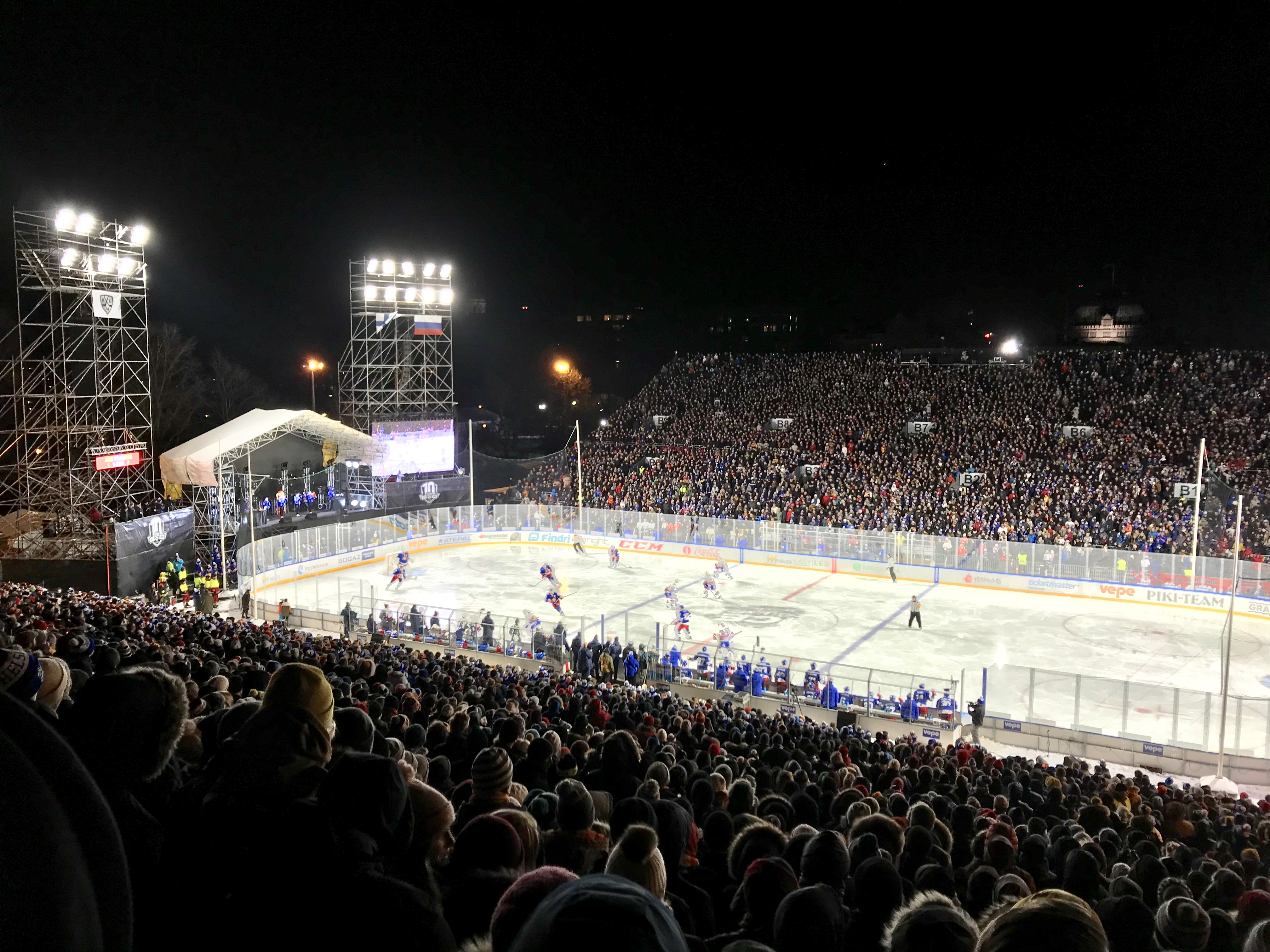 Helsinki Ice Challenge in Kaisaniemi Park: Jokerit vs. SKA.